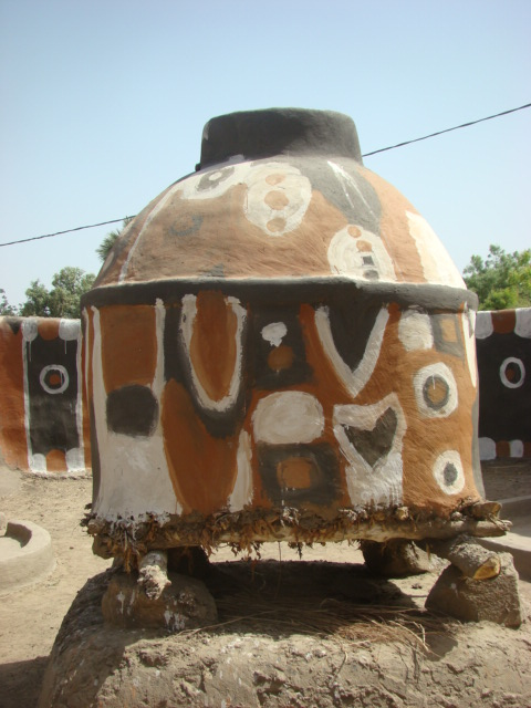 Pot pour les réserves de grains de culture dans la ville de Kay Kay Mousgom, dans la région de l’Extrême-Nord